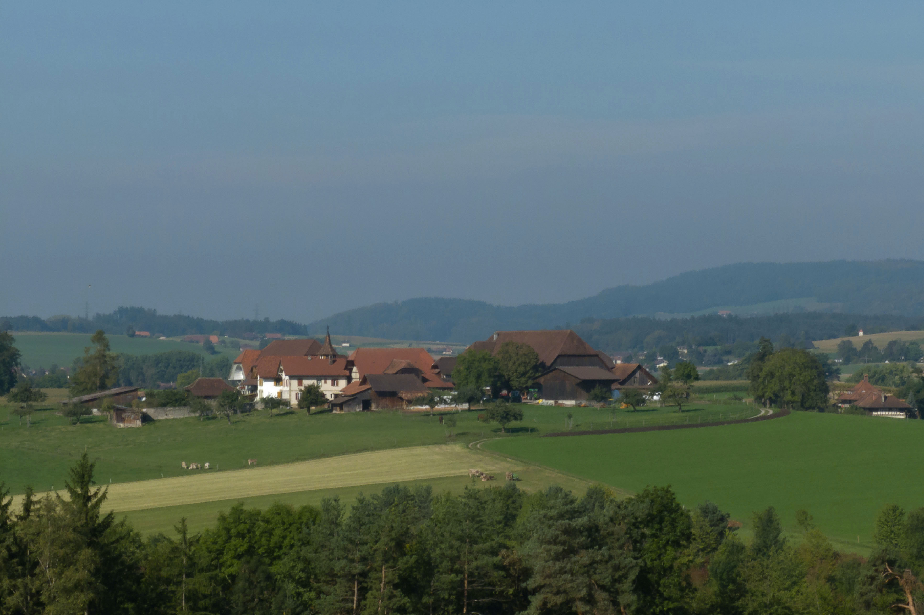 Weiler Bühlikofen, Zollikofen. Sicht vom Betagtenheim